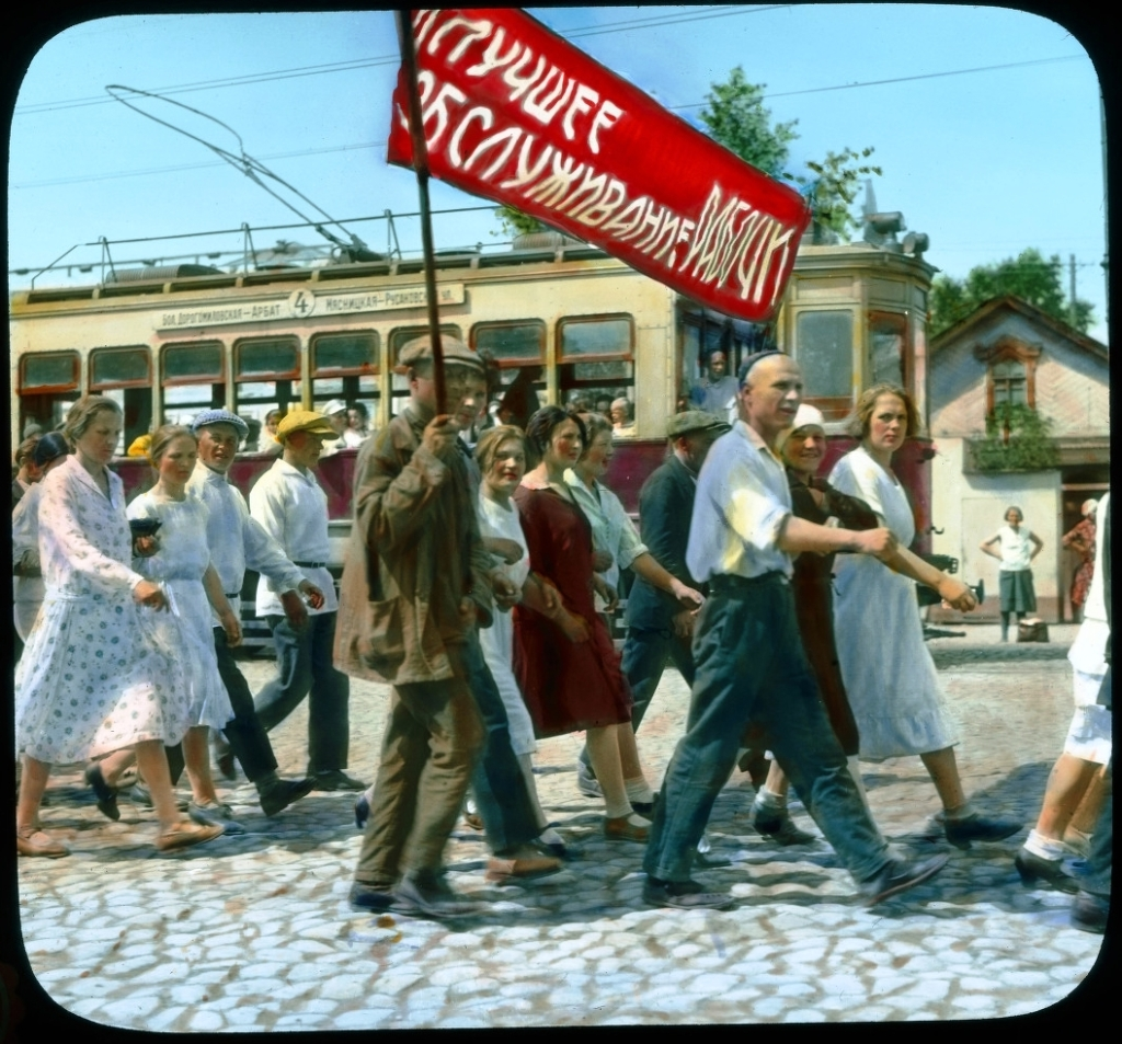 Москва. Лучшее обслуживание - рабочим